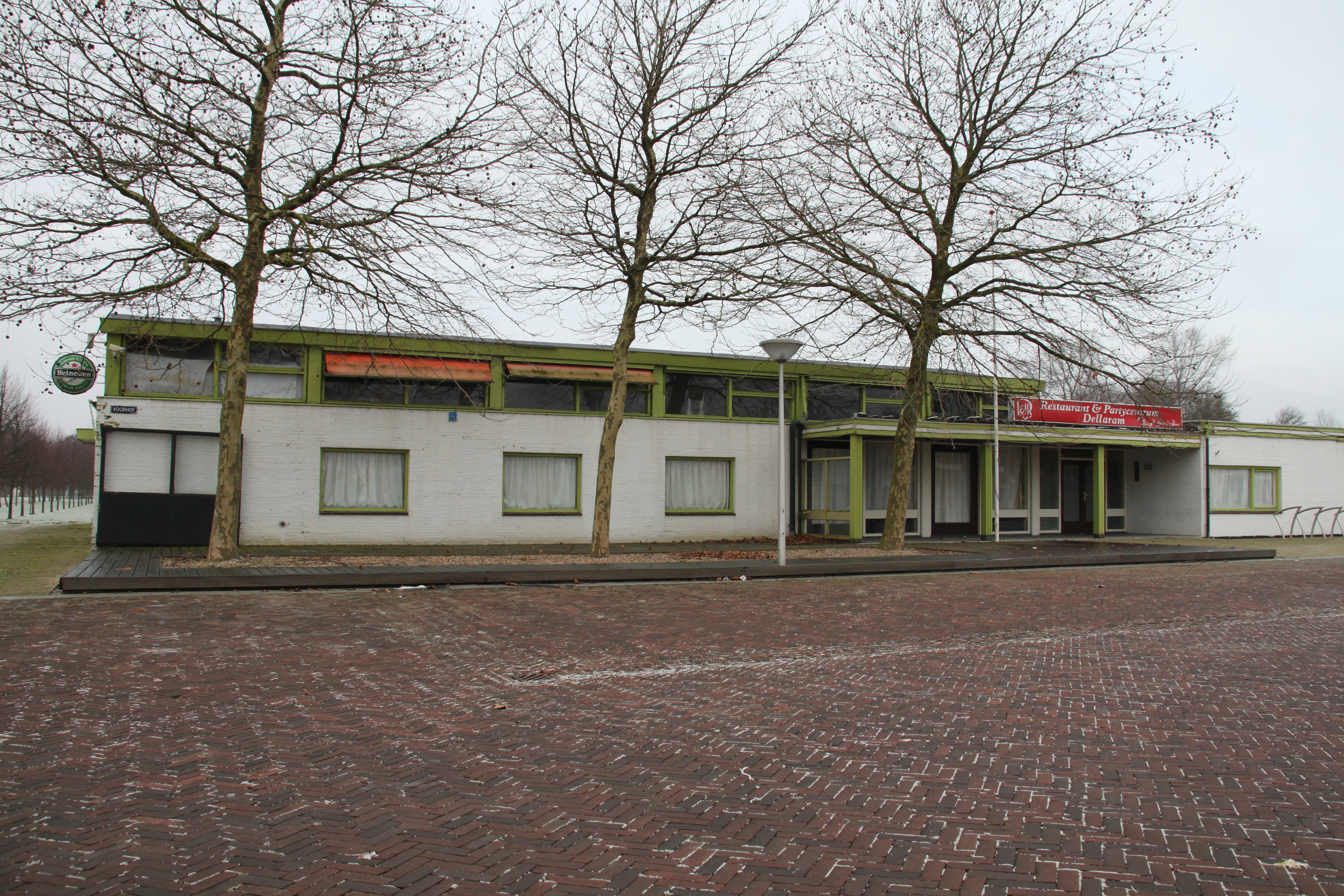 Restaurant in Nagele.